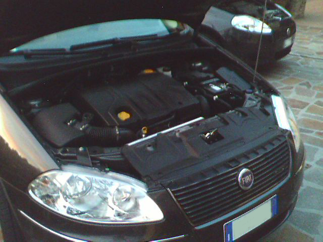 motore multijet 1.9 da 120cv su fiat Croma con dietro una fiat Grande Punto